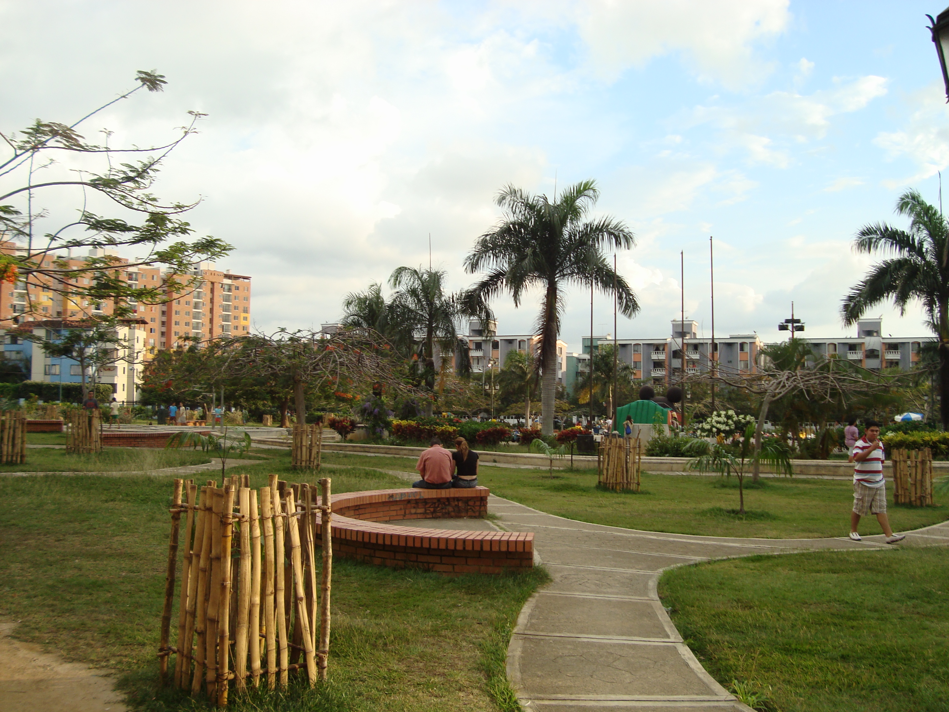 El parque las cigarras está ubicado en una zona muy residencial de la ciudad, llamada la ciudadela, un sector muy tranquilo.